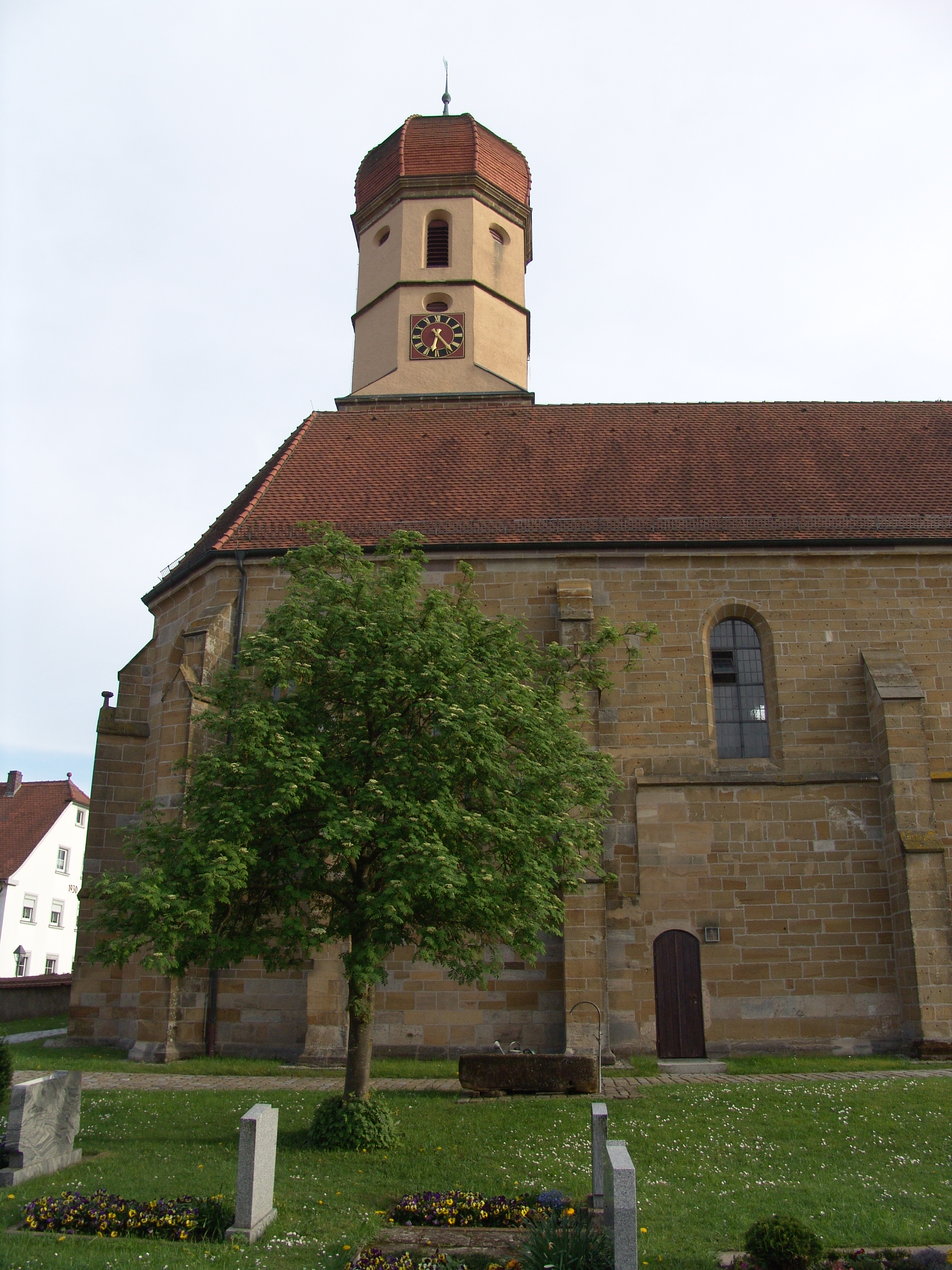 evang.-luth. Kirche St. Johannis in Aufkirchen